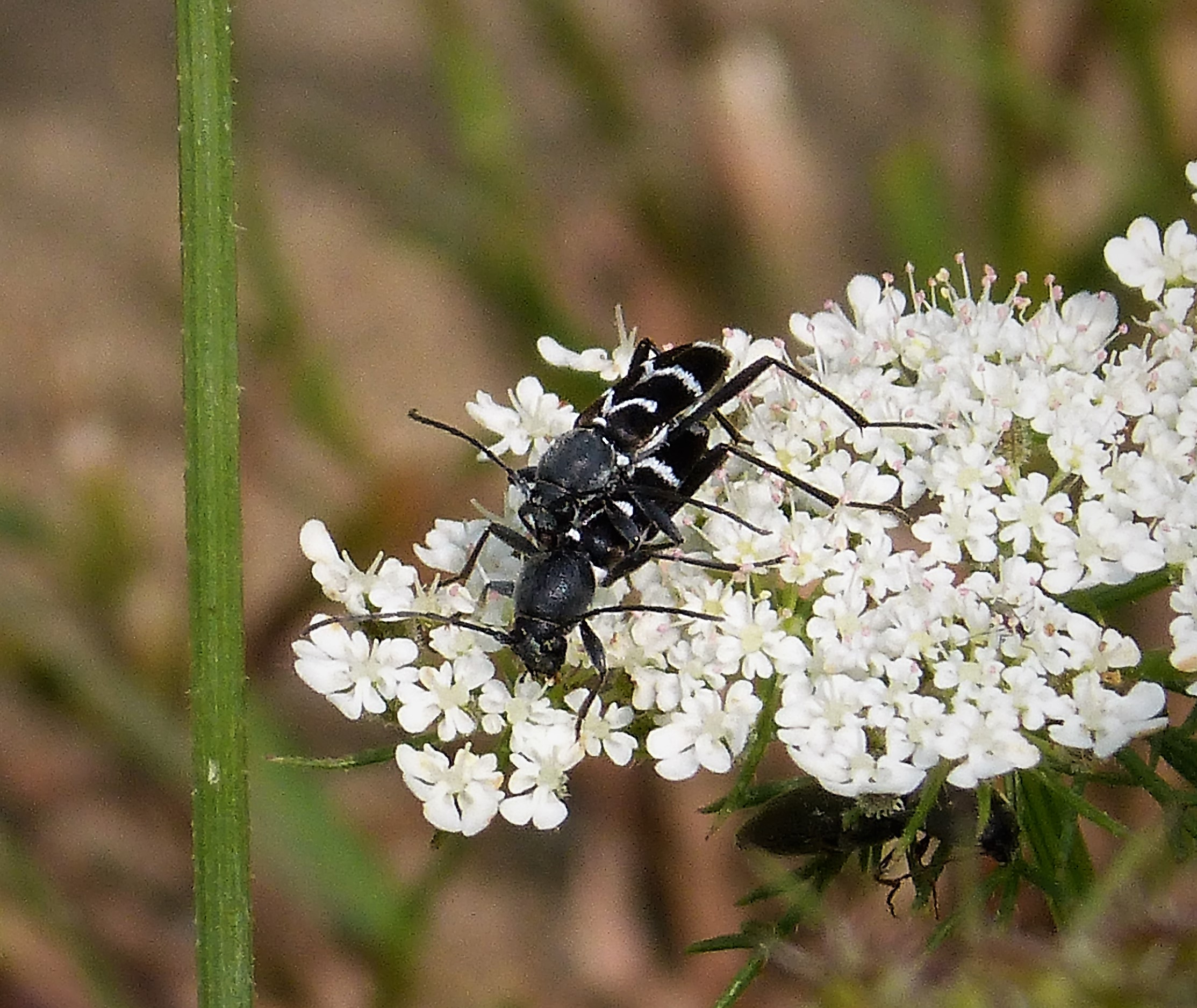 Vjose-Narte Salinas near Vlore, Albania